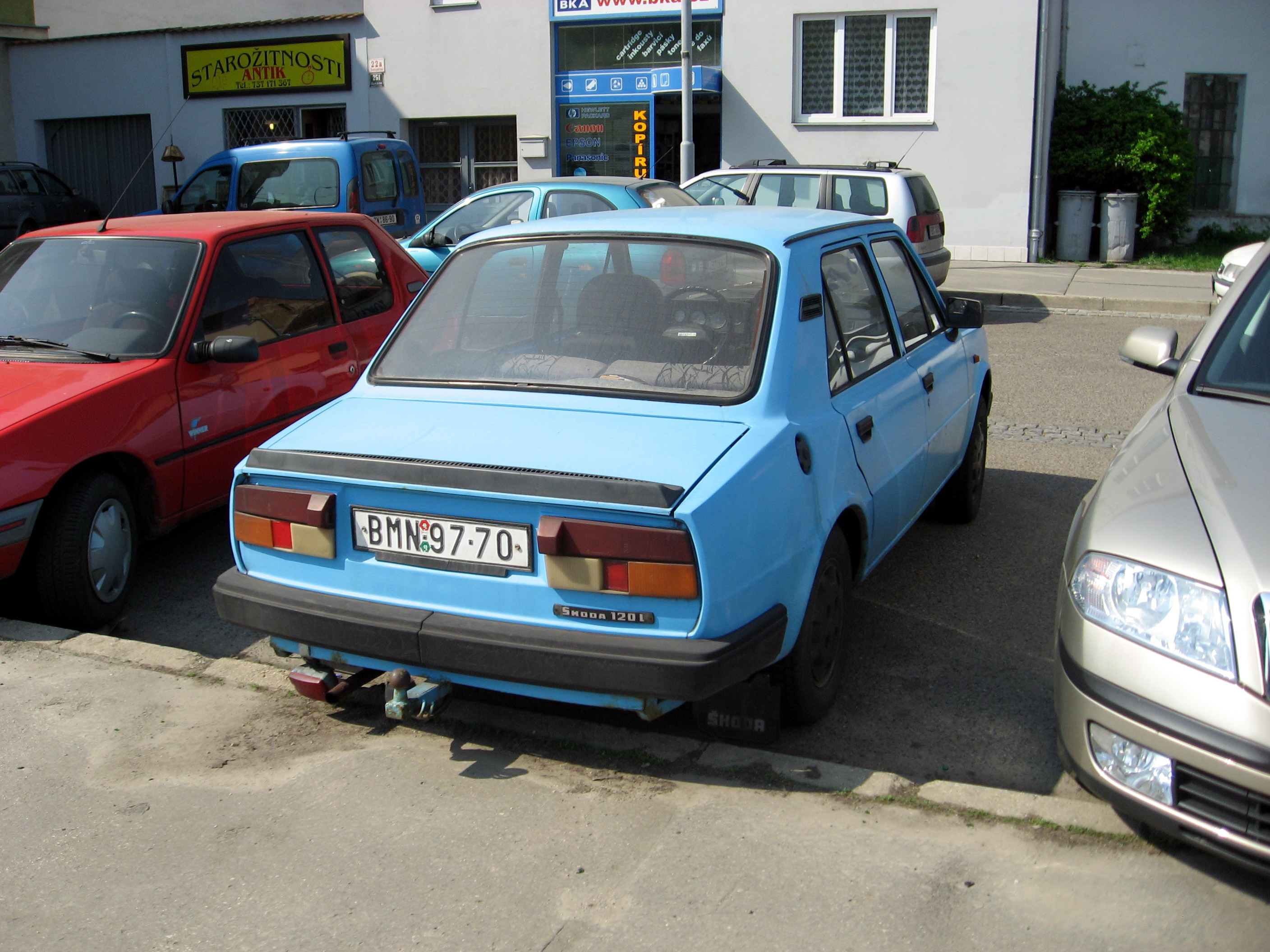 Škodovka v Brně